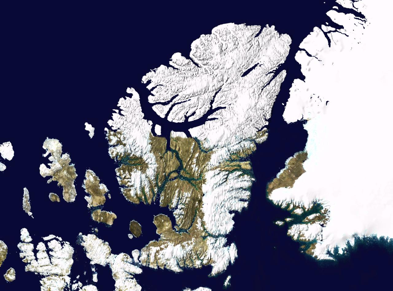 Ellesmere Island in Nunavut, Canada.